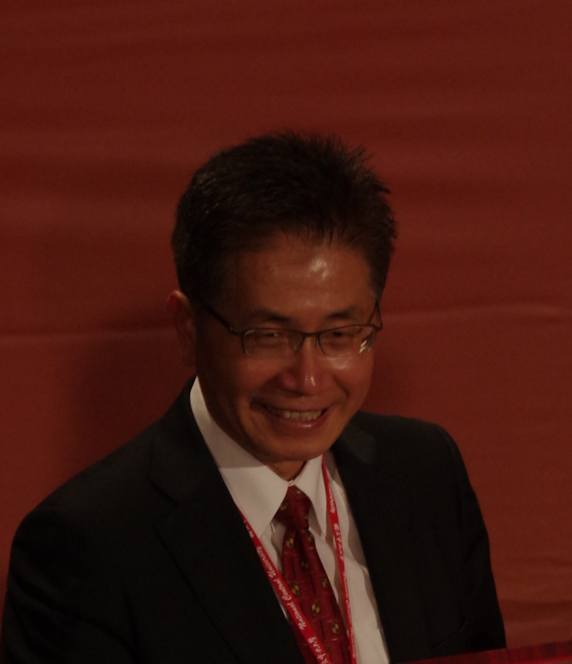 國立中央大學校長周景揚。